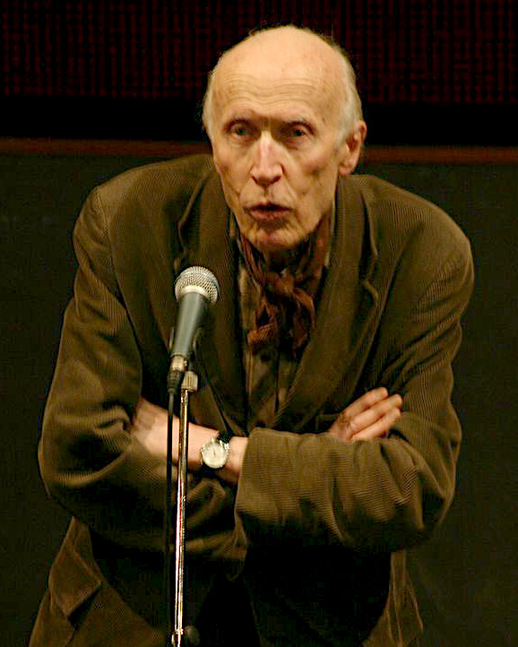 Eric Rohmer à la cinémathèque française